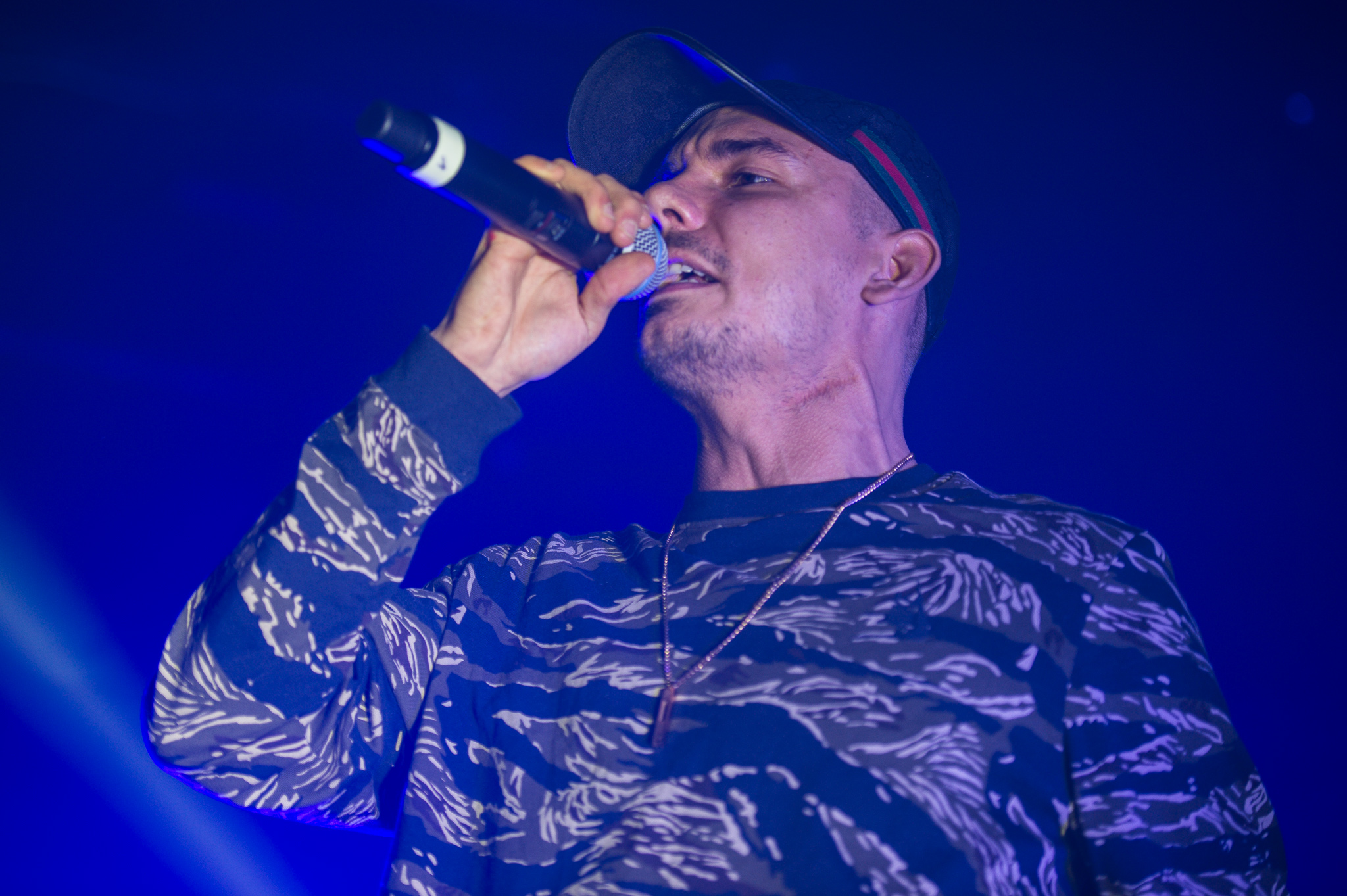 Capital Bra,Concertbüro Franken,Der Hirsch,Konzert,Livekonzert,Livemusik,Musik,Vladislav Balovatsky